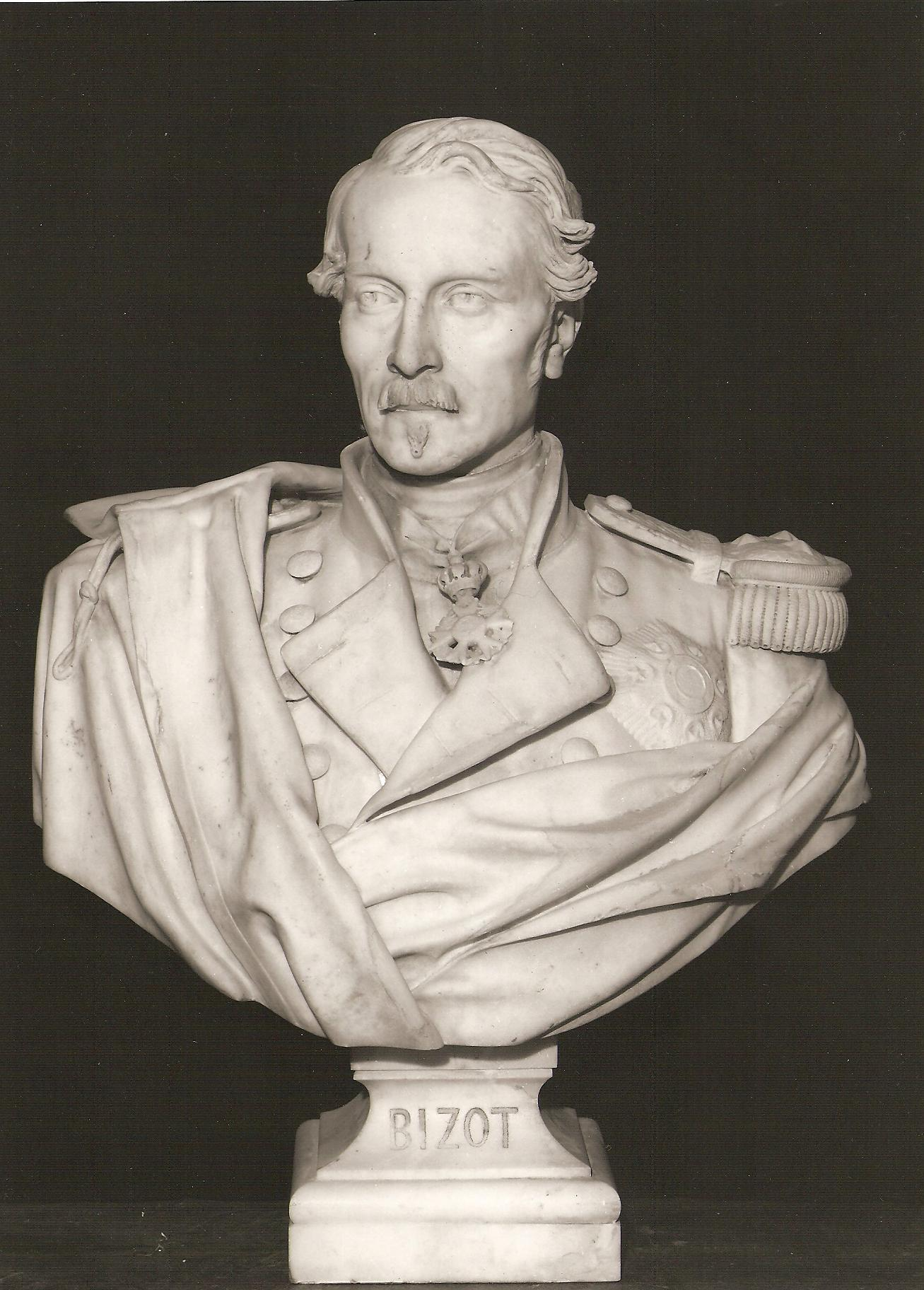 reproduction d'un buste de Michel Bizot (musée de Versailles) Michel Brice Bizot, né le 2 octobre 1795 et mort le 12 avril 1855